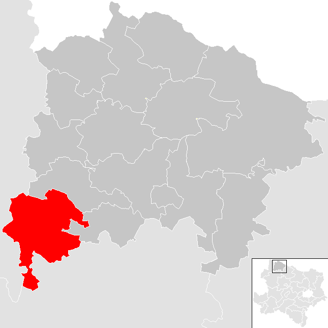 Bezirk Waidhofen an der Thaya